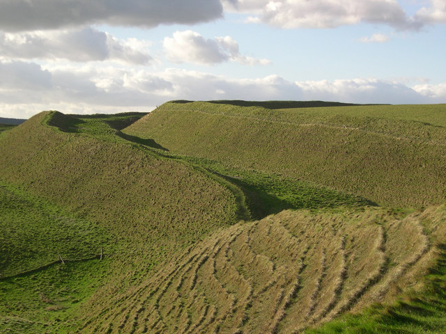 Maiden Castle, Dorset, England.